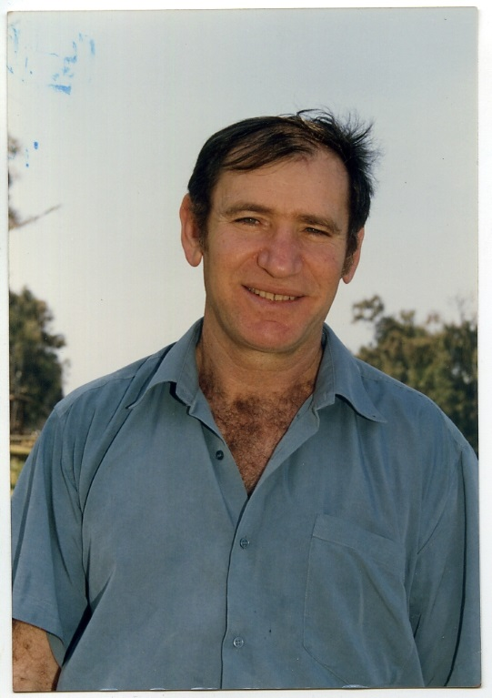 אלי רוה